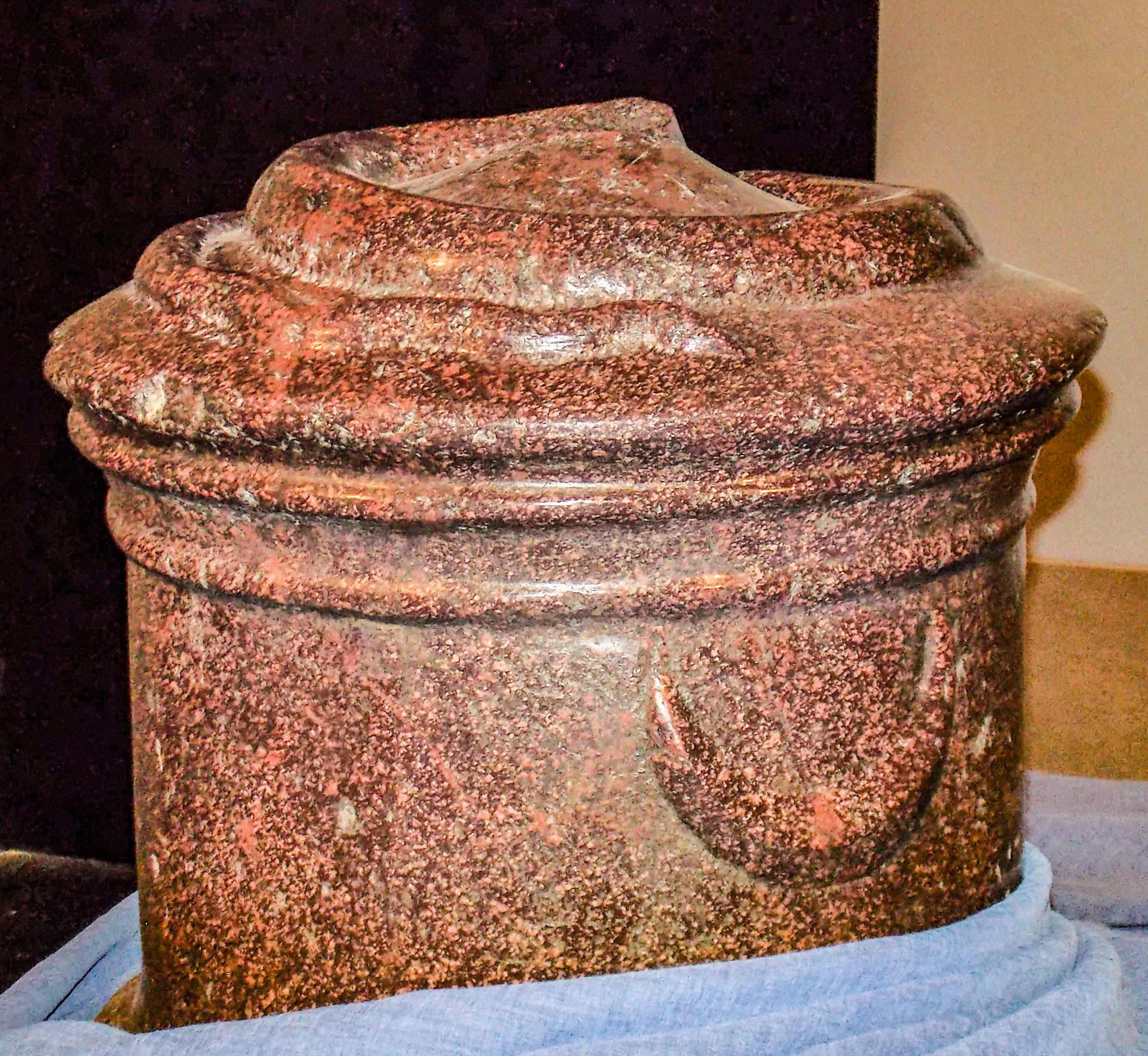 Un reperto del tempio di Iside di Benevento conservato nella sezione egizia del Museo del Sannio, presso il museo ARCOS. Cista mystica.